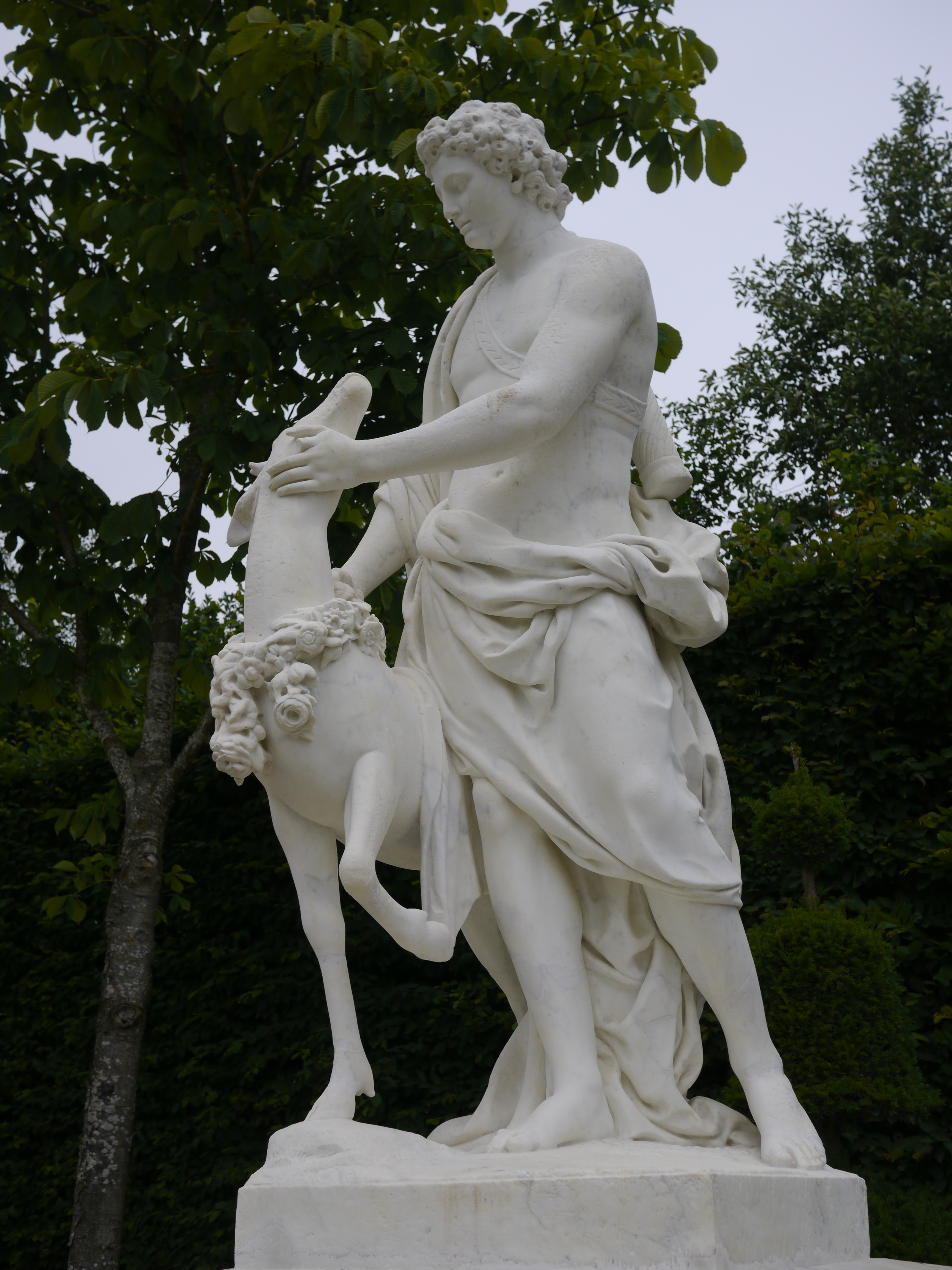 Anselme Flamen (1647-1717), Cyparisse caressant son cerf (1687) - Allée Royale, parc du Château de Versailles.